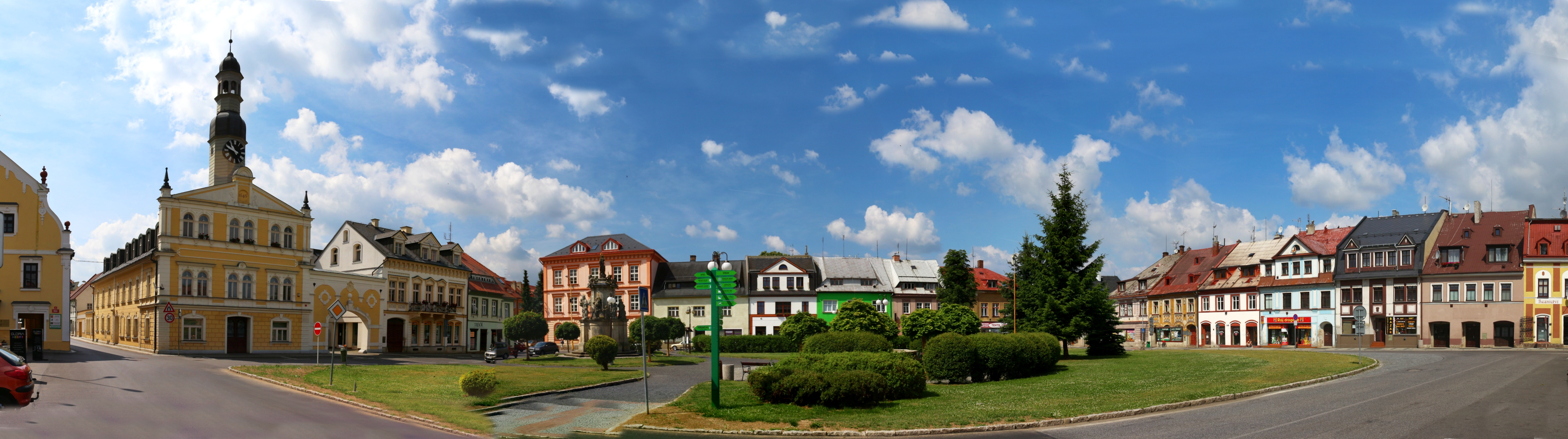 Chrastava